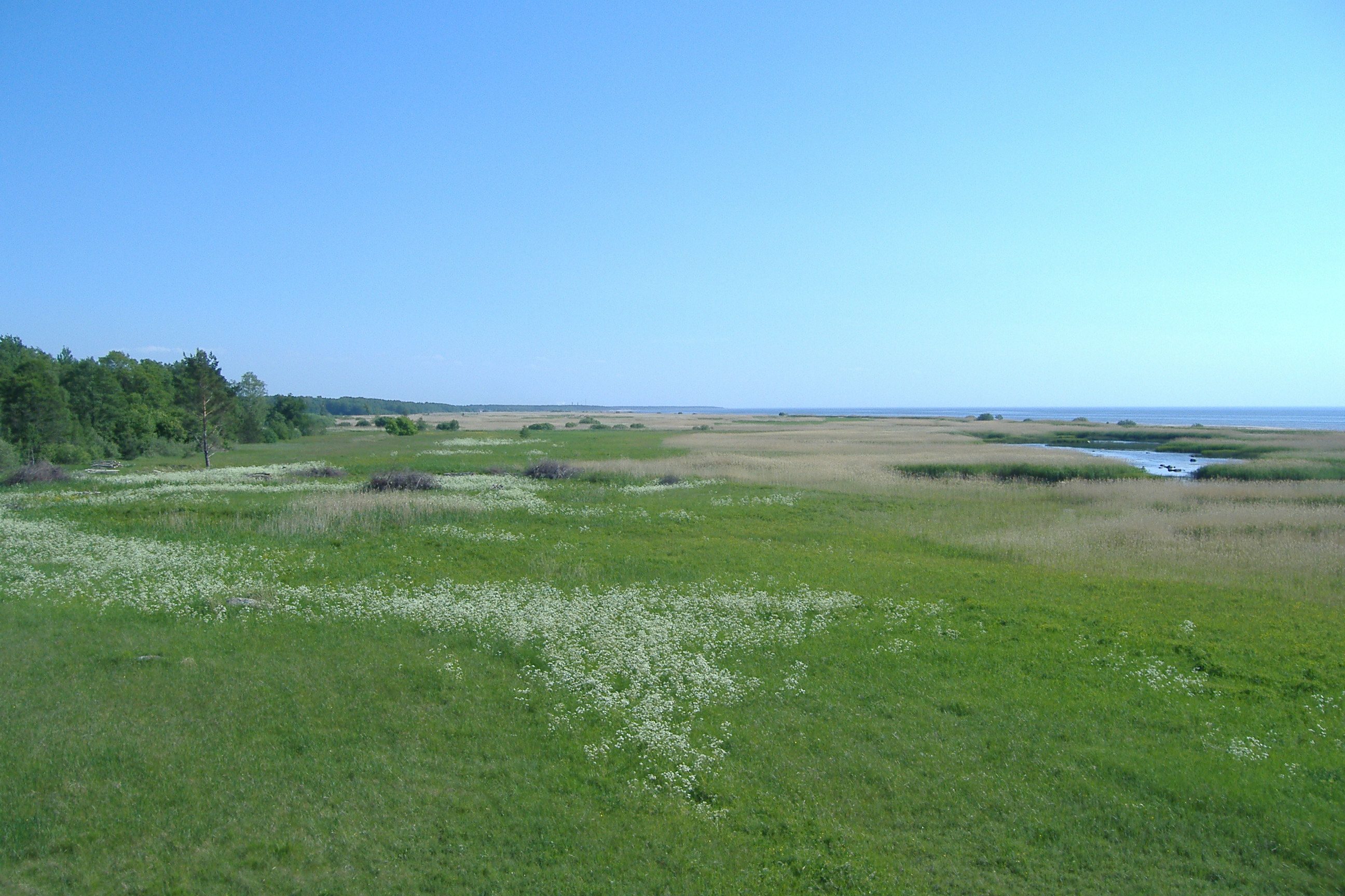 Randu pļavas